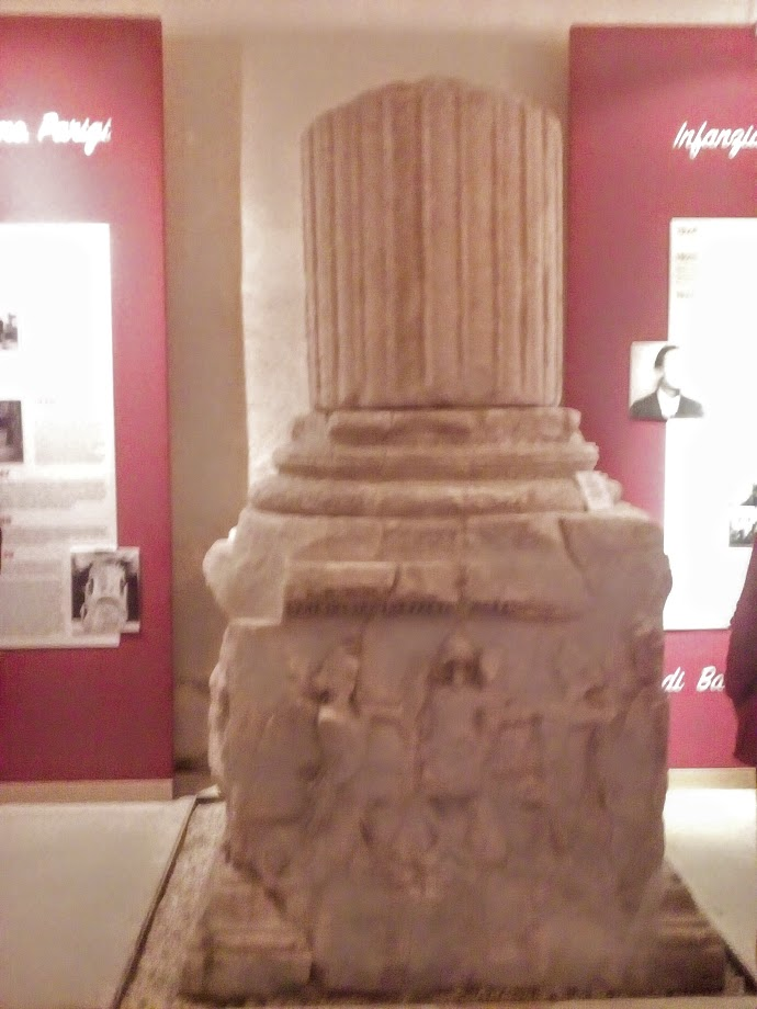 Plinto Romano conservato al castello Ursino